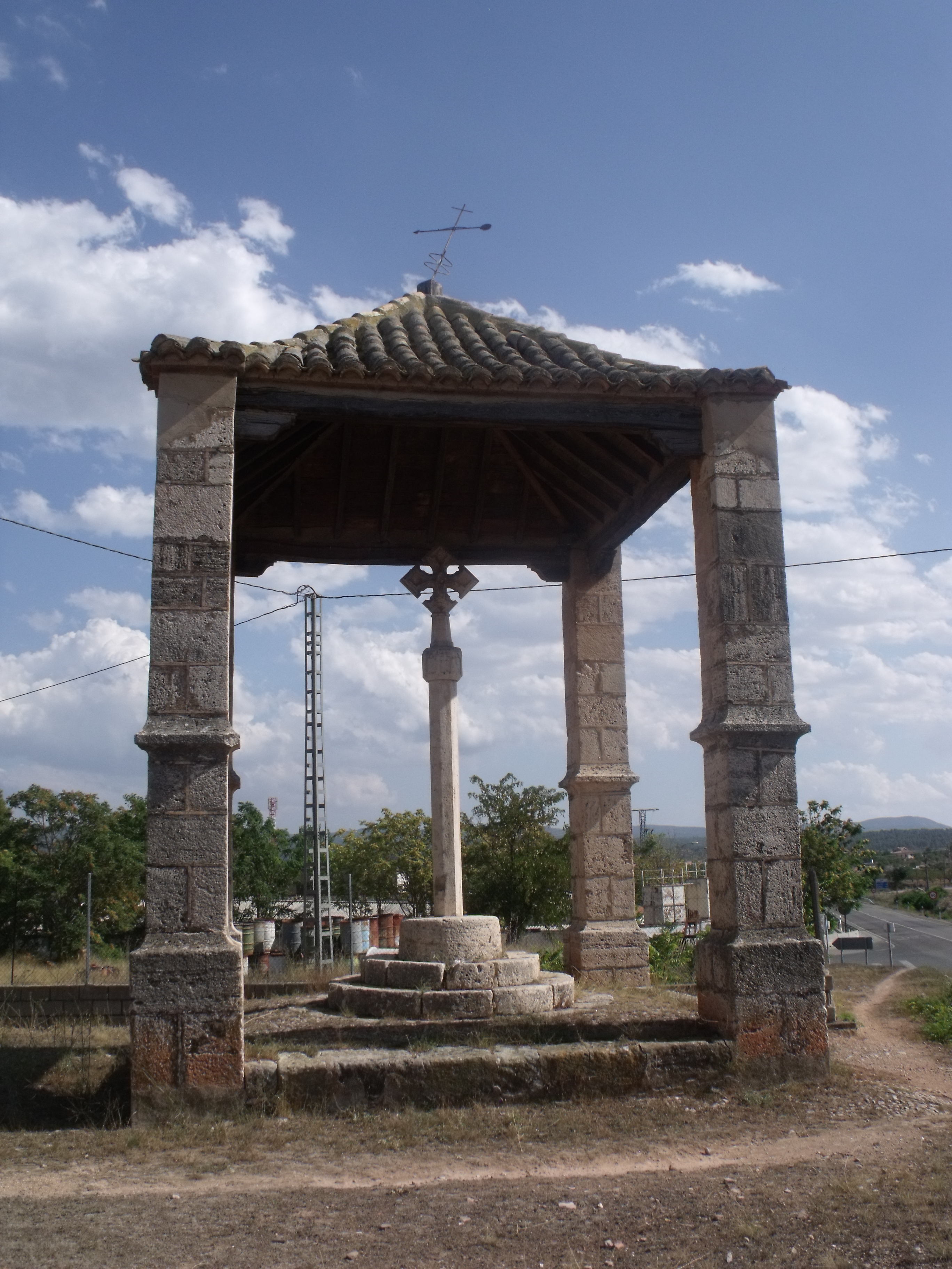 Cruz de San Antón.